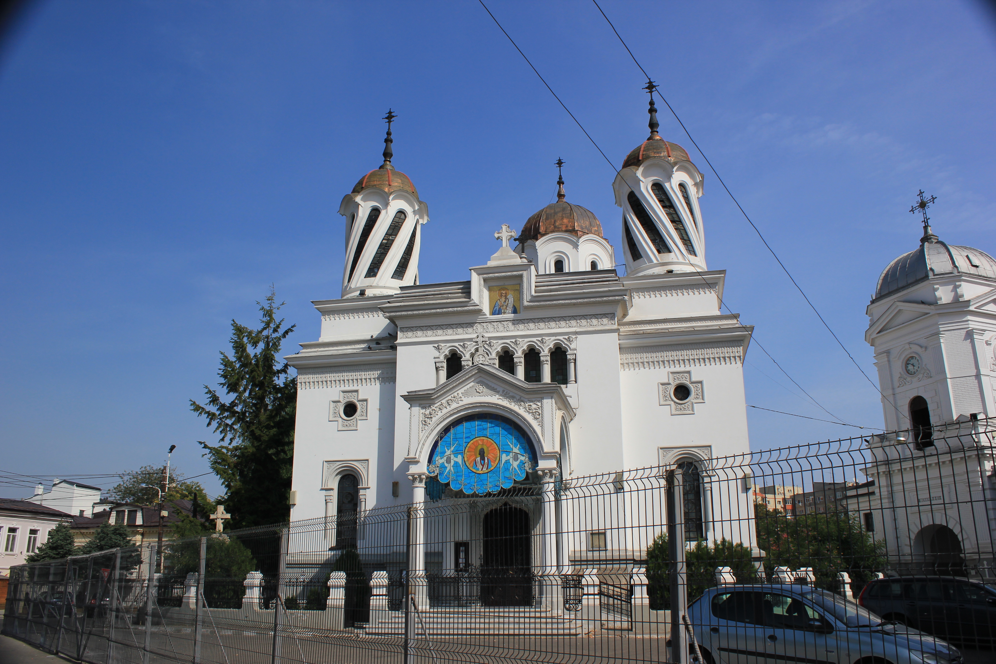 Ansamblul Bisericii Silvestru - str Silvestru 36